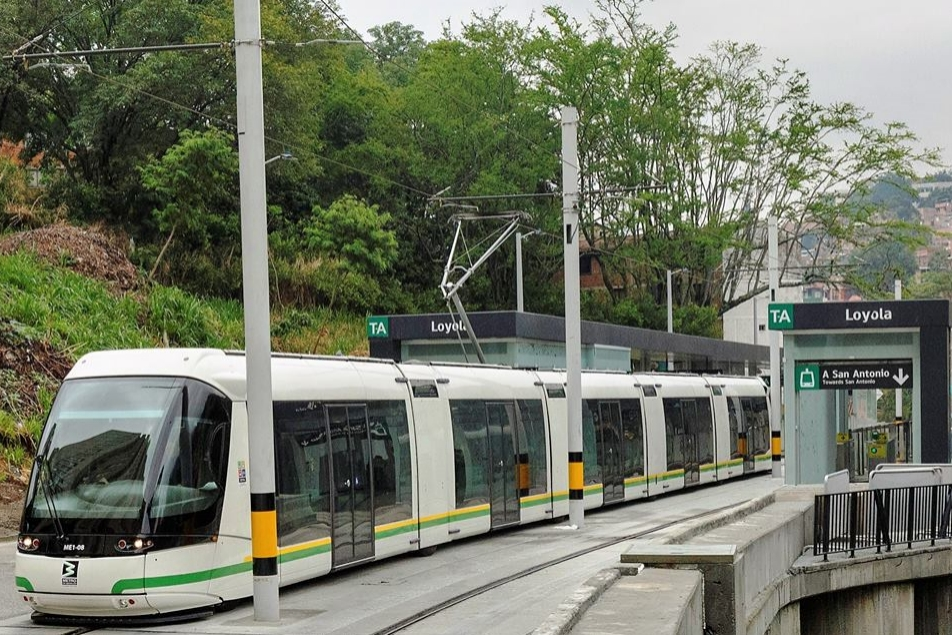 Estación Loyola (Metro de Medellín)